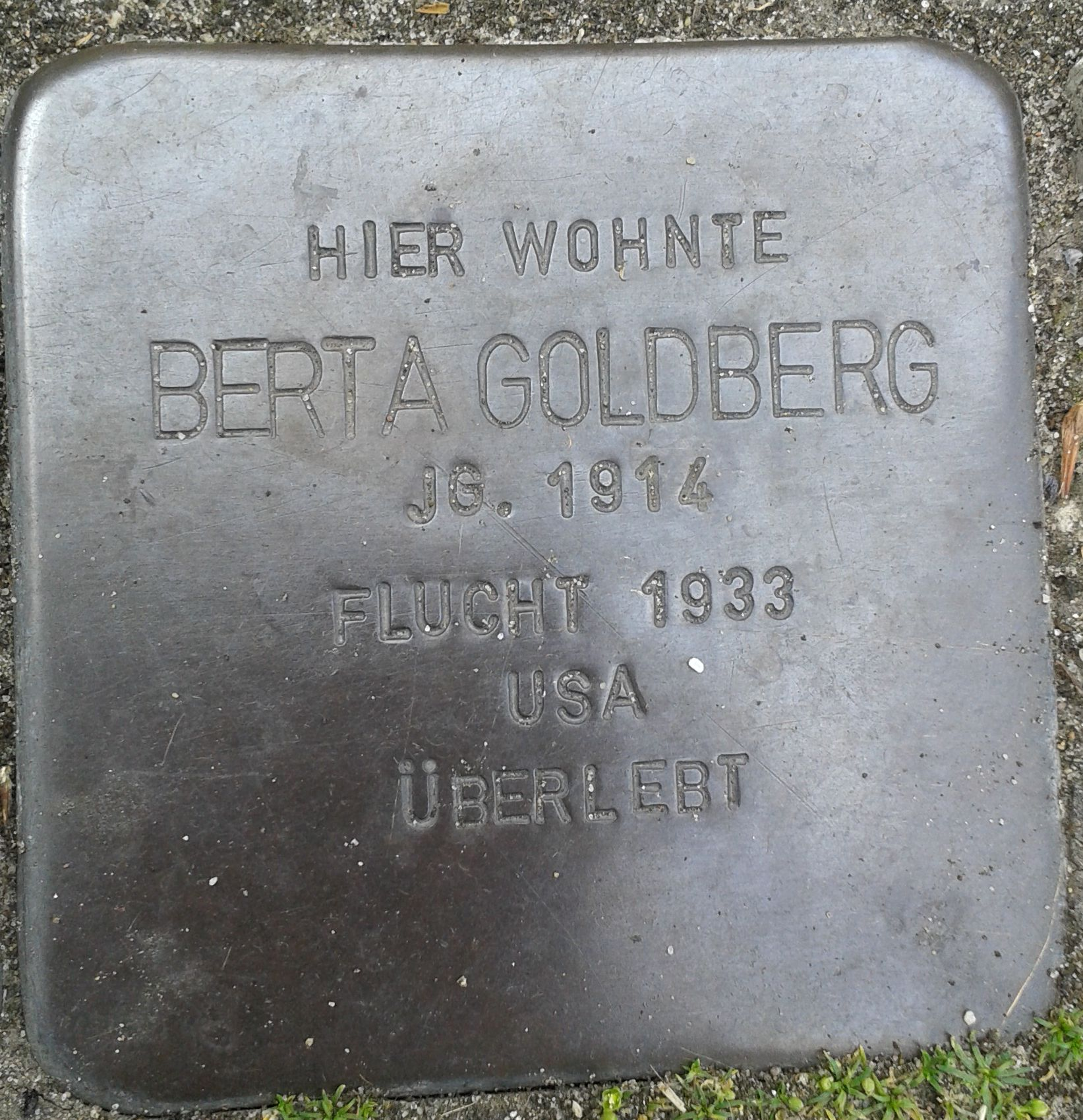 Stolperstein Datteln Carl-Gastreich-Straße 5 Berta Goldberg